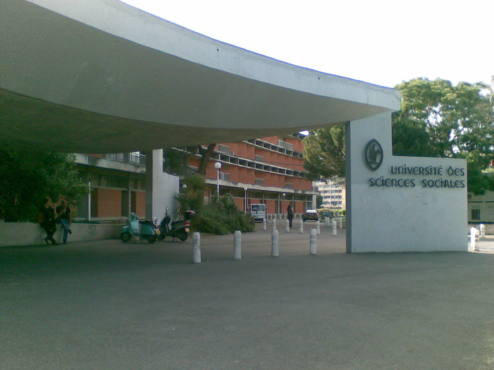 Toulouse, Université Toulouse 1, entrée principale, site de l'Arsenal